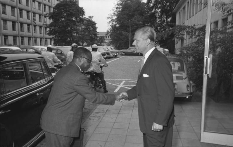 Vertragsunterzeichung im Auswärtigen Amt zwischen Staatssekretär van Scherpenberg und dem Finanzminister von Ghana. Begrüßung des Botschafters von Ghana in Bonn, S.E. Theodore O. Asare durch den Chef des Protokolls, Botschafter Freiherr von Braun.